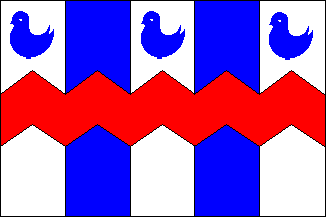 Vlag van Hemiksem, provicie Antwerpen, België. Bron